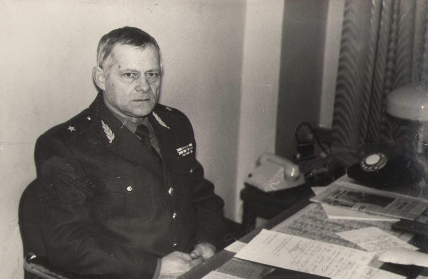 Владимир Дмитриевич Королев